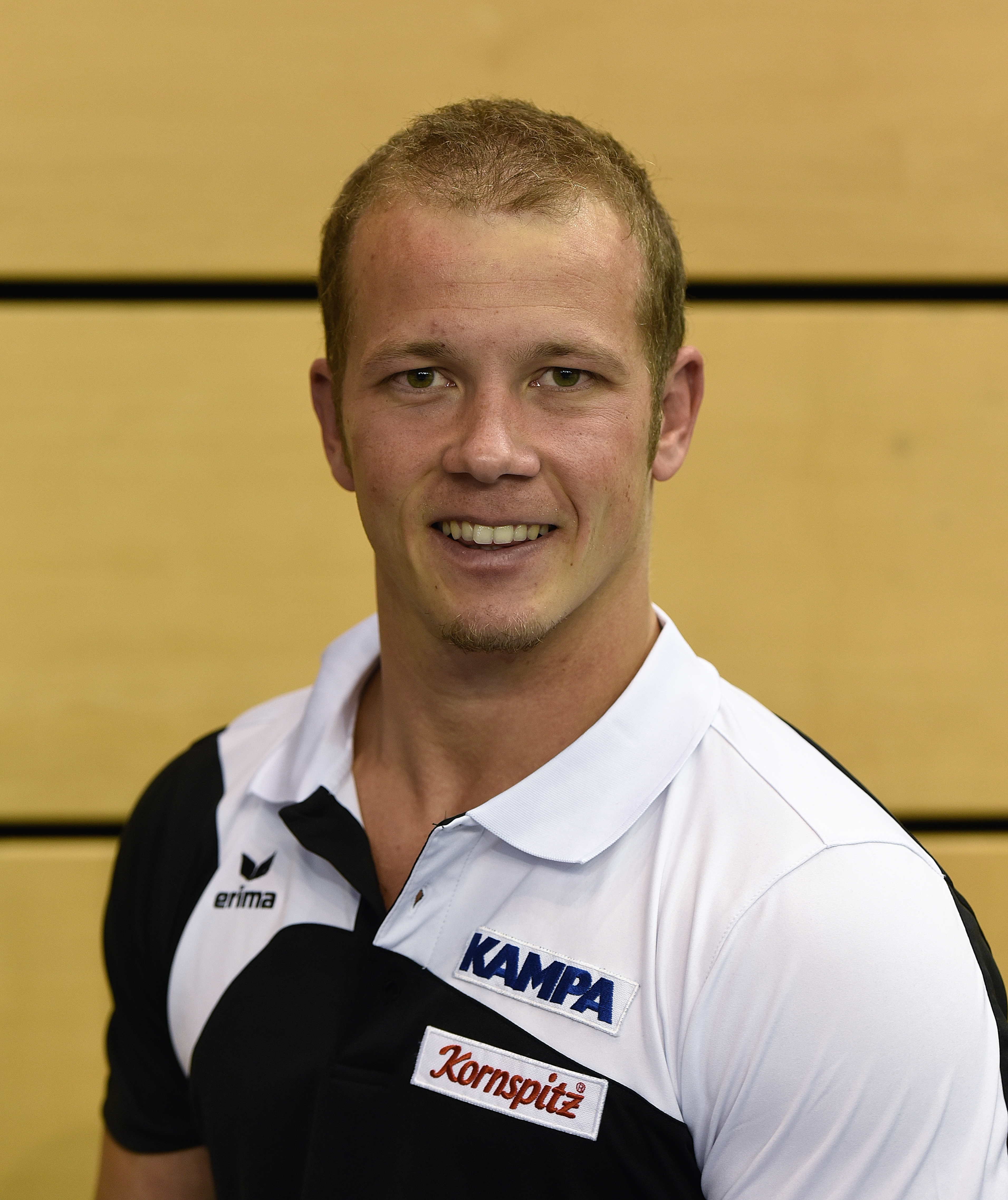 Deutsche Jugendmeisterschaften Gerätturnen männlich AK 13–18 Einturnen Gerätefinals beim Internationalen Deutschen Turnfest Berlin 2017. Abgebildet: Fabian Hambüchen.